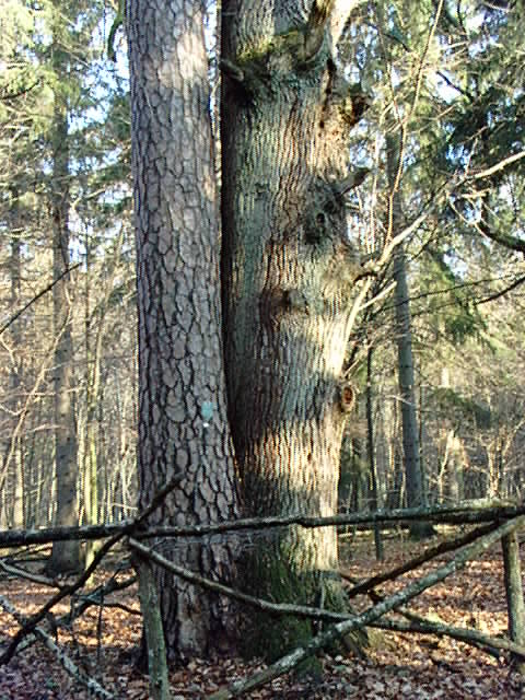 Rezerwat przyrody Szczekotowo - pomnik przyrody